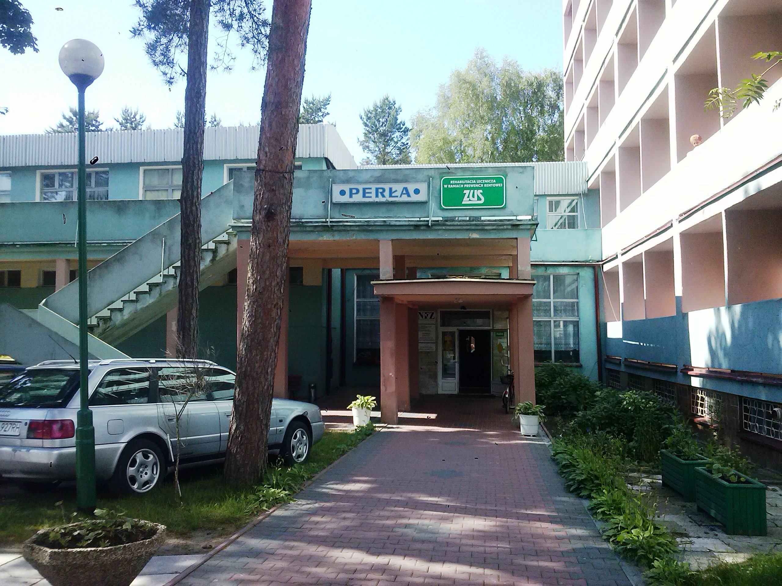 W tym miejscu była straznica WOP w Międzywodziu